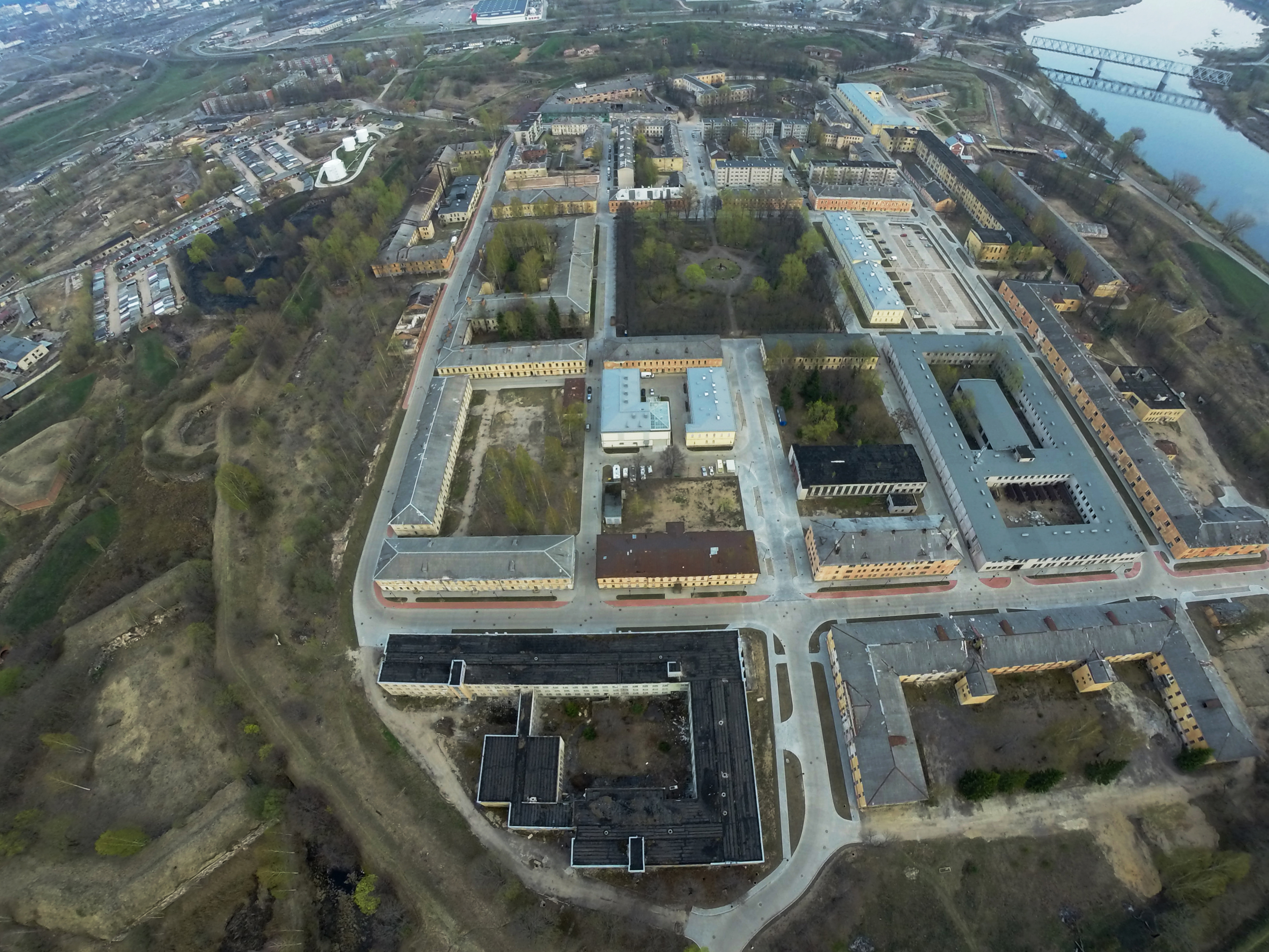 вся крепость высоты птичего полета- Daugavpils fortress bird's eye view